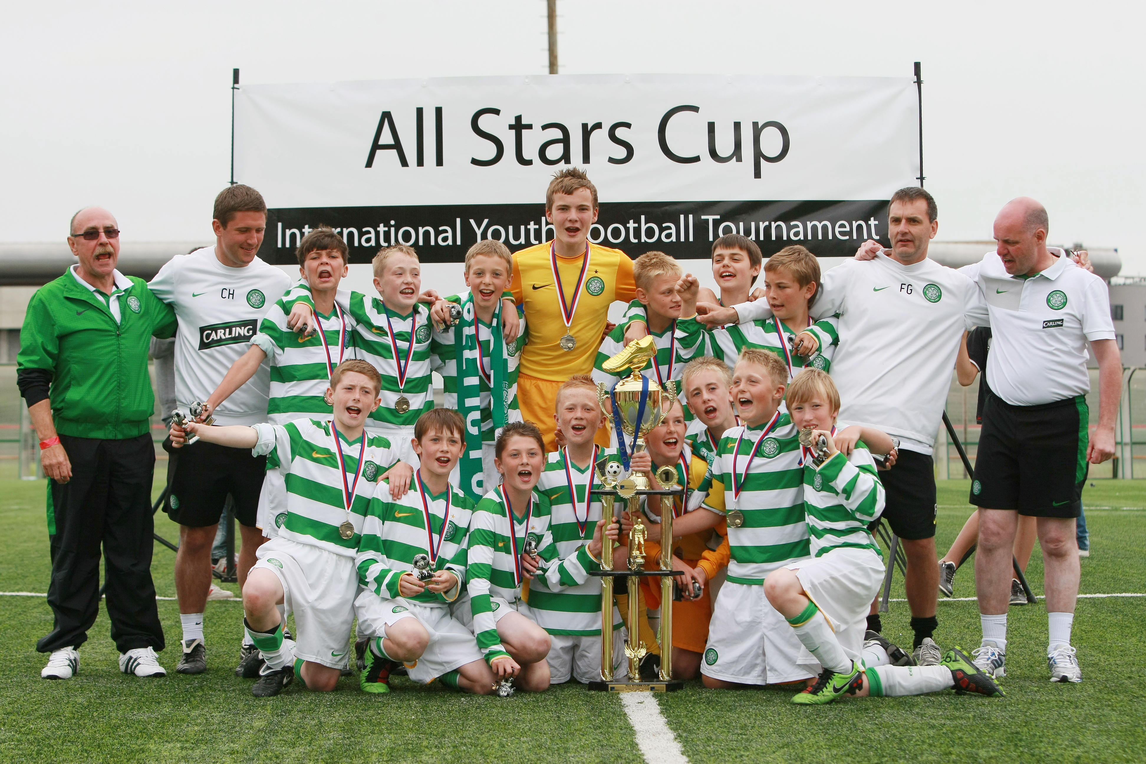 vítěz ASC 2010 Celtic Glasgow